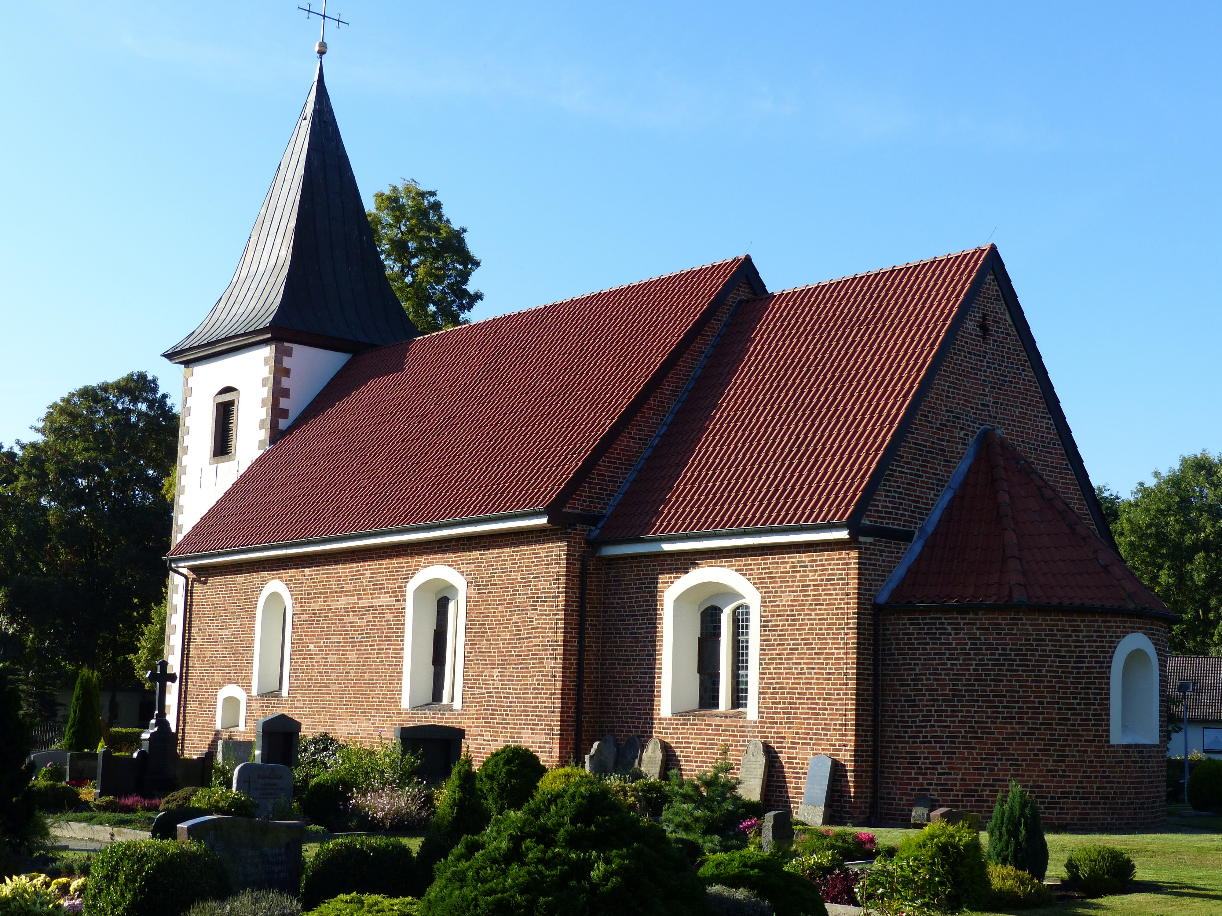 Katharinenkirche in Neuenkirchen bei Bassum von Südosten